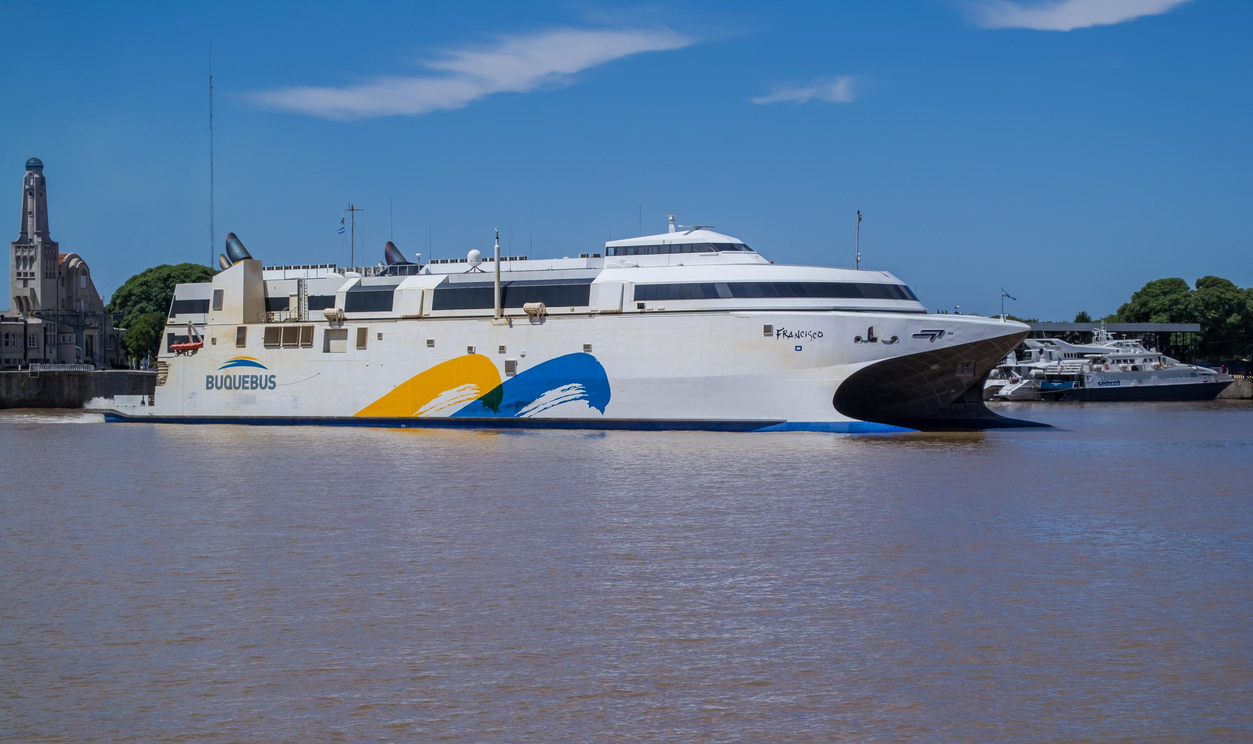 Ferry Francisco en la Dársena Norte del puerto de Buenos Aires.